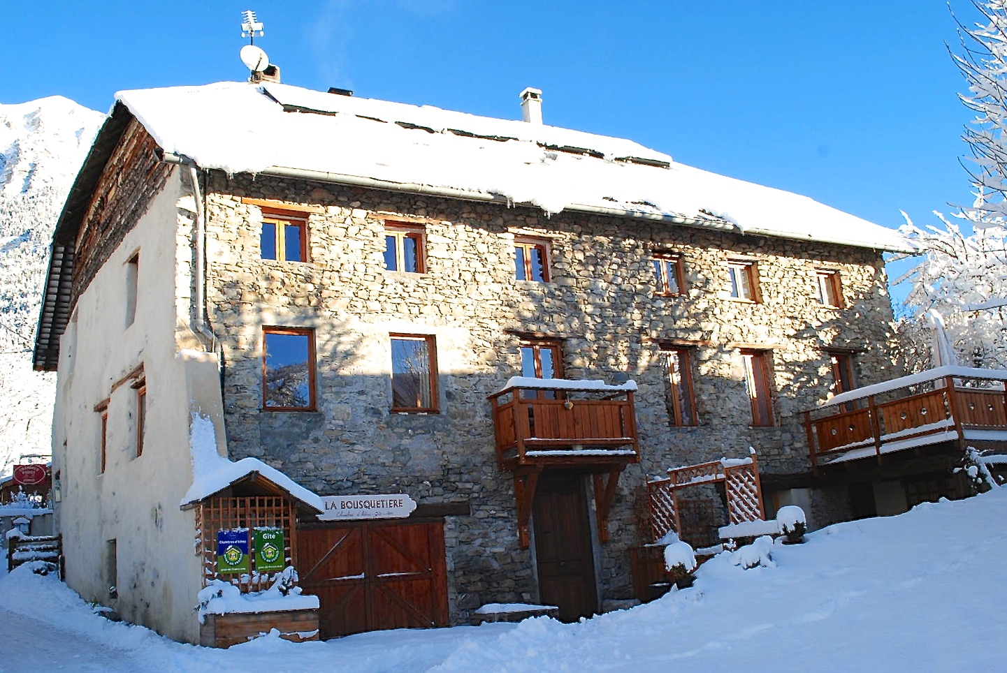 Jausiers, hameau des Sanières, La Bousquetière hiver